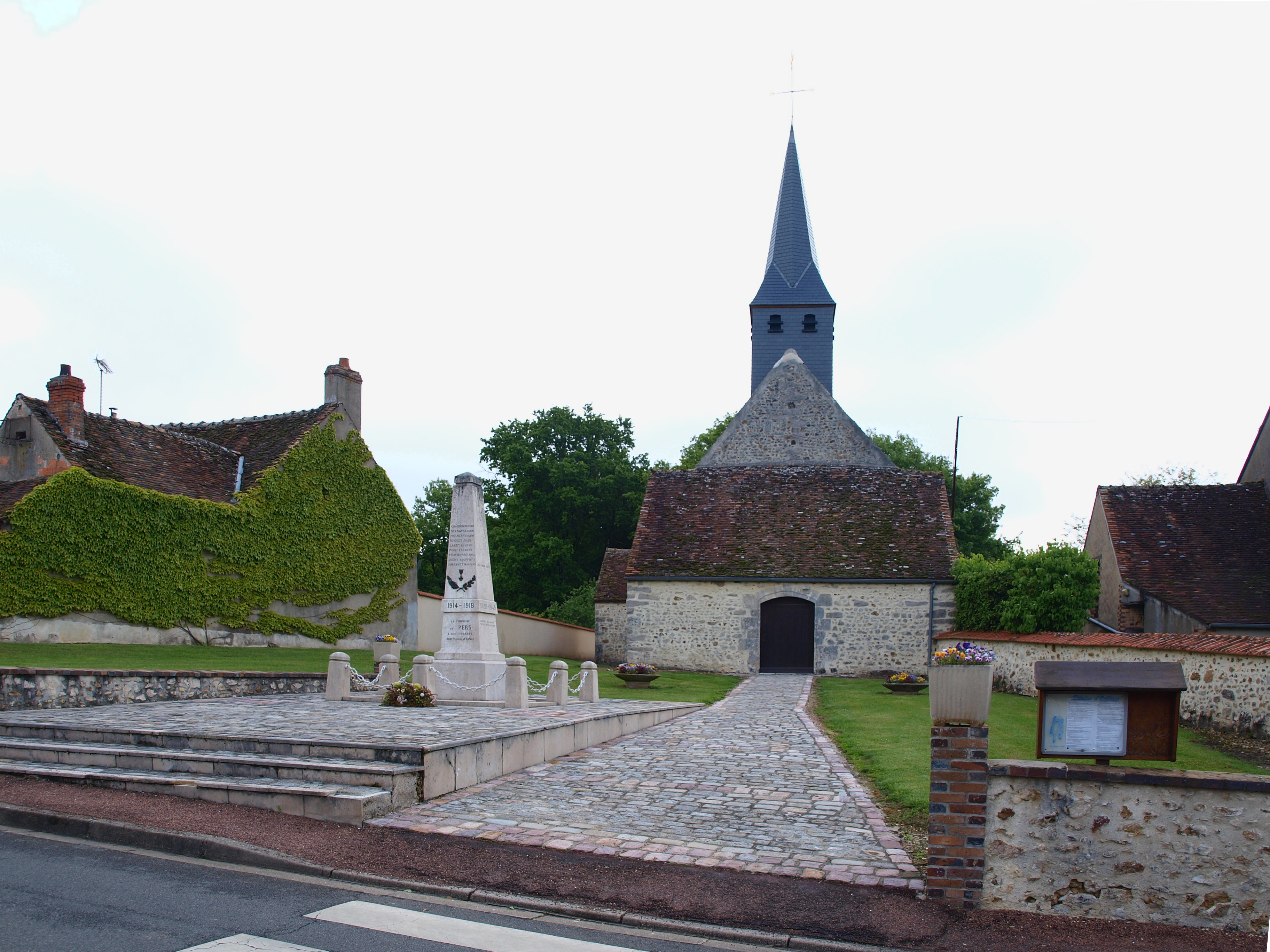 Pers-en-Gâtinais (Loiret, France) ; l'église et le monument aux morts.